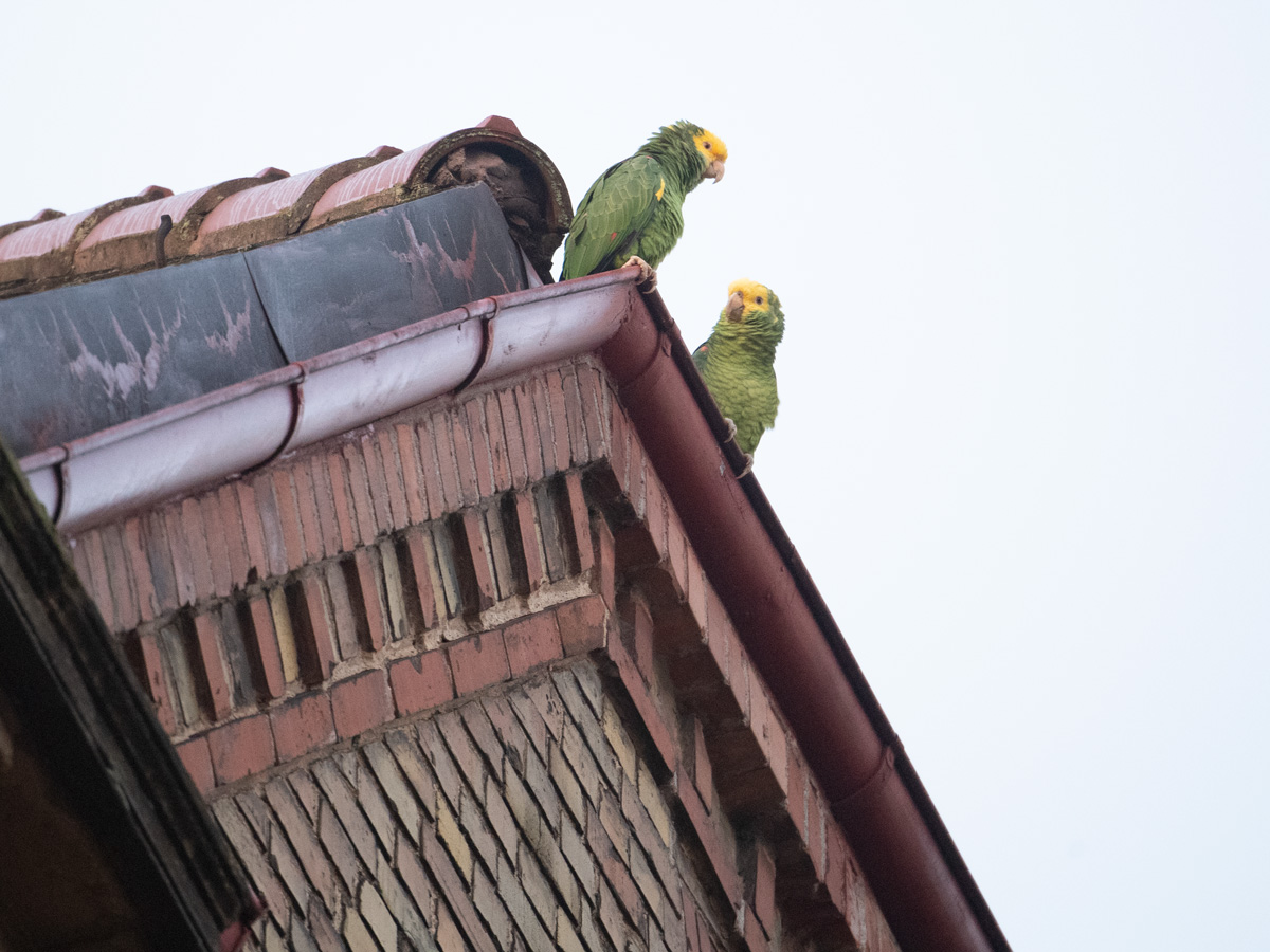 Gelbkopfamazonen auf einem Hausdach in Stuttgart (A. oratrix)